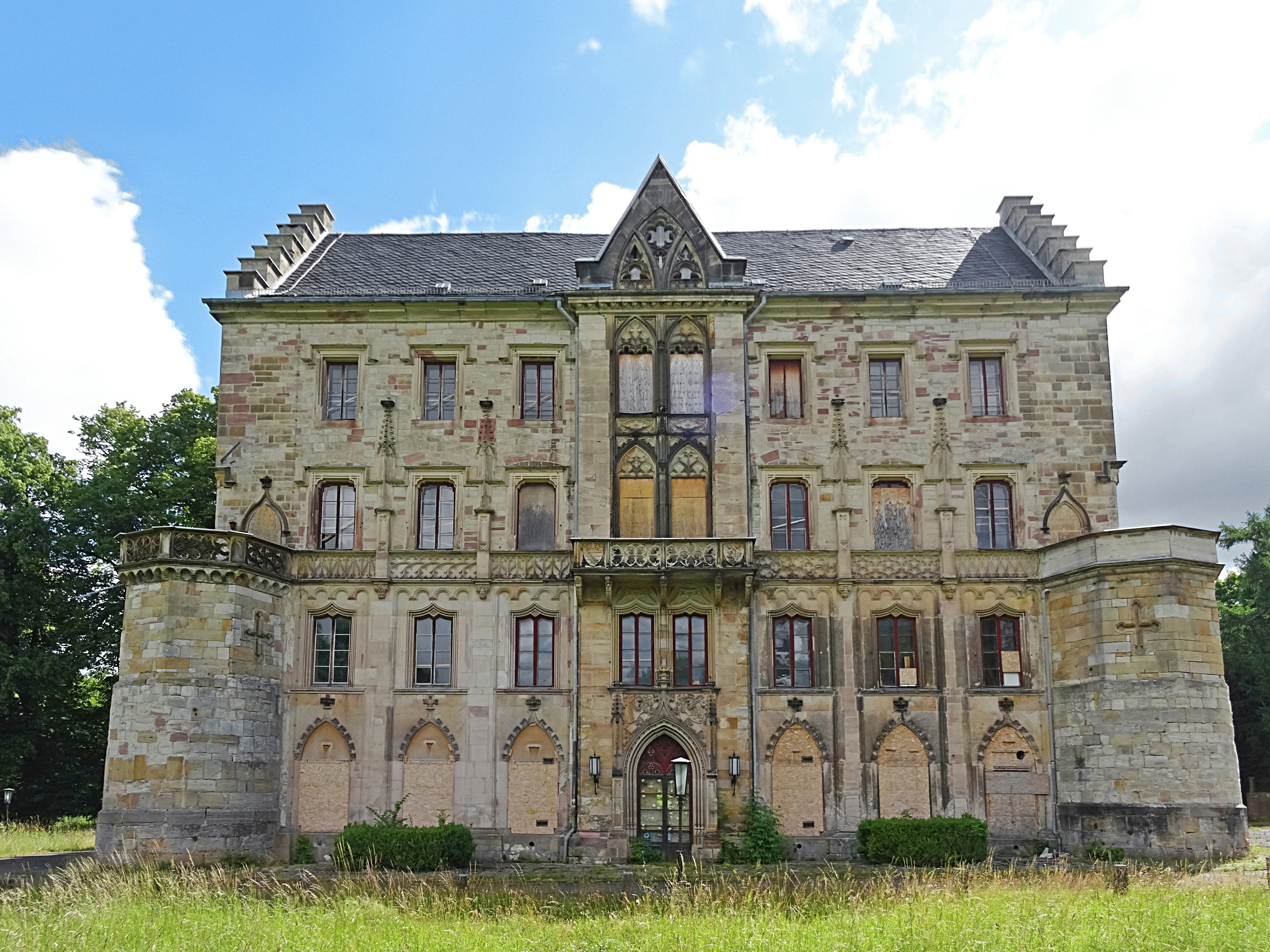 Schloss Reinhardsbrunn von Westen 2020